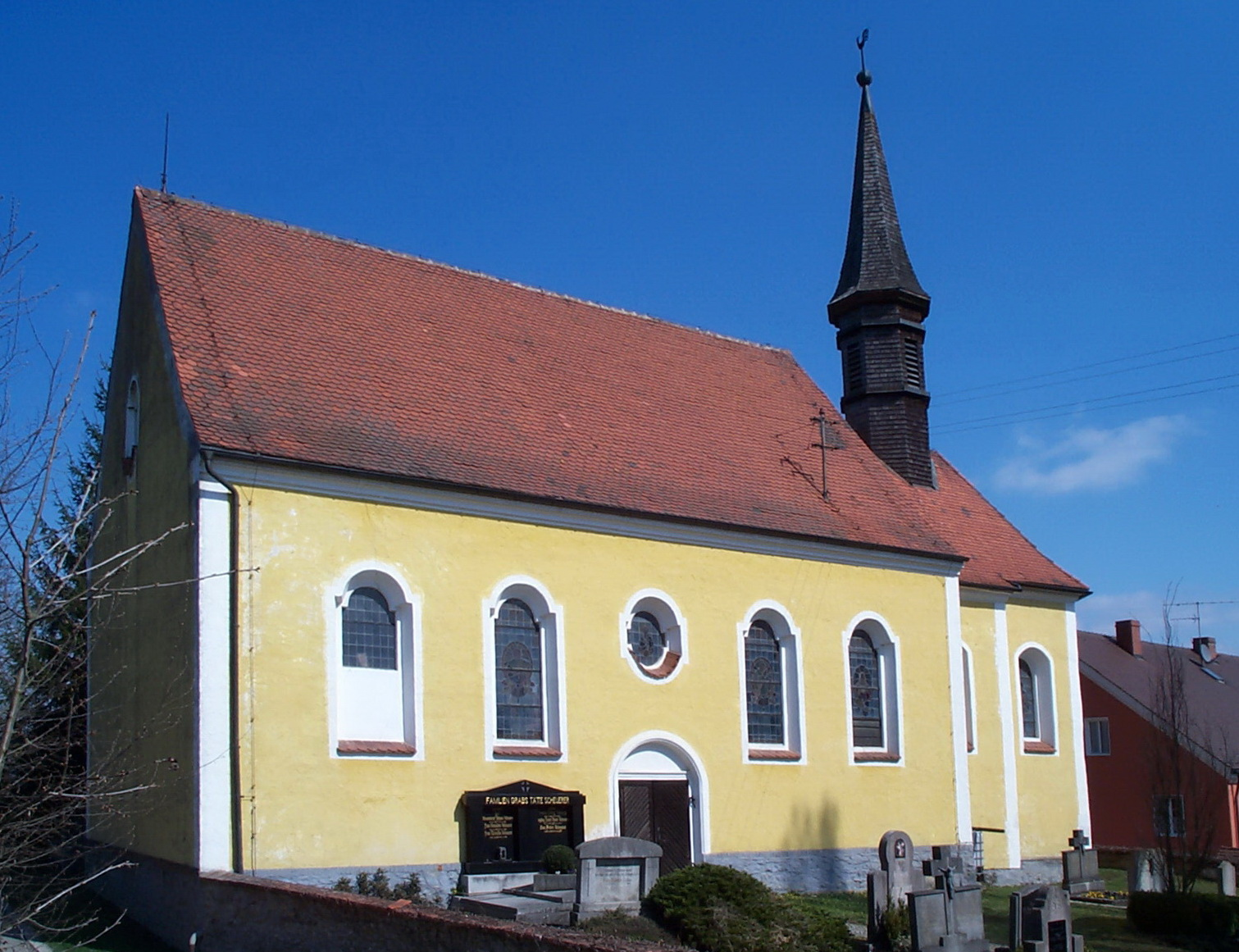 Kirchgasse 14. Kath. Nebenkirche St. Vitus, Saalbau mit eingezogenem Chor und verschindeltem Dachreiter mit Spitzdach, 17./18. Jh.; mit Ausstattung; Friedhofsmauer, Bruchstein und Ziegel, 18./19. Jh.